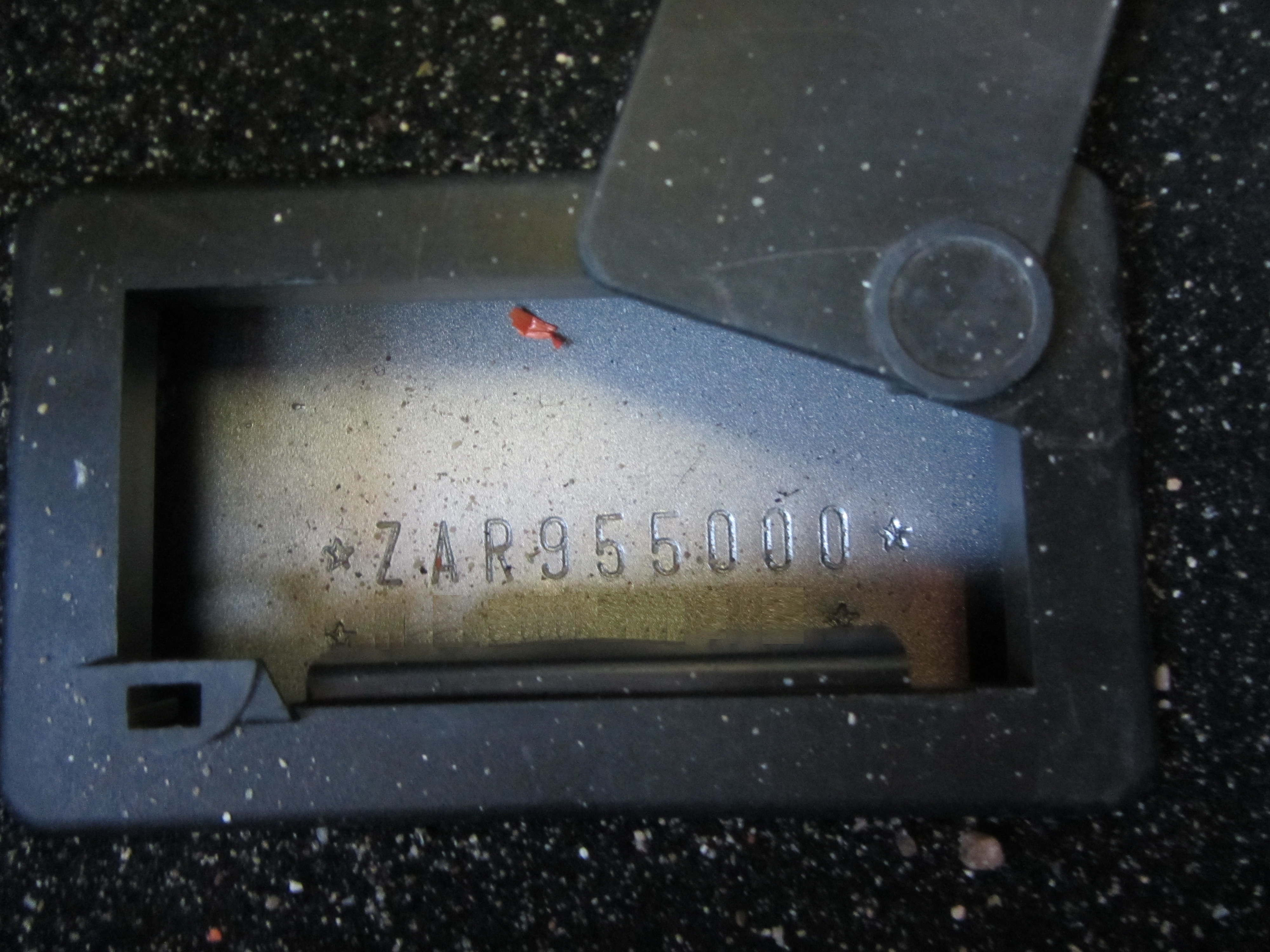 progetto ZAR 955 (Alfa Romeo Mito) codice